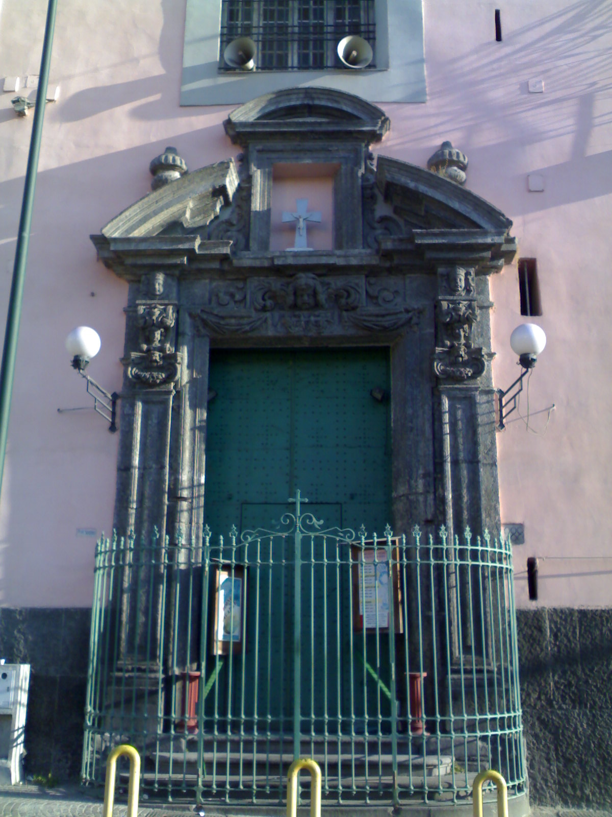 Chiesa di Santa Maria Maddalena dei Pazzi (Napoli, il portale in piperno)